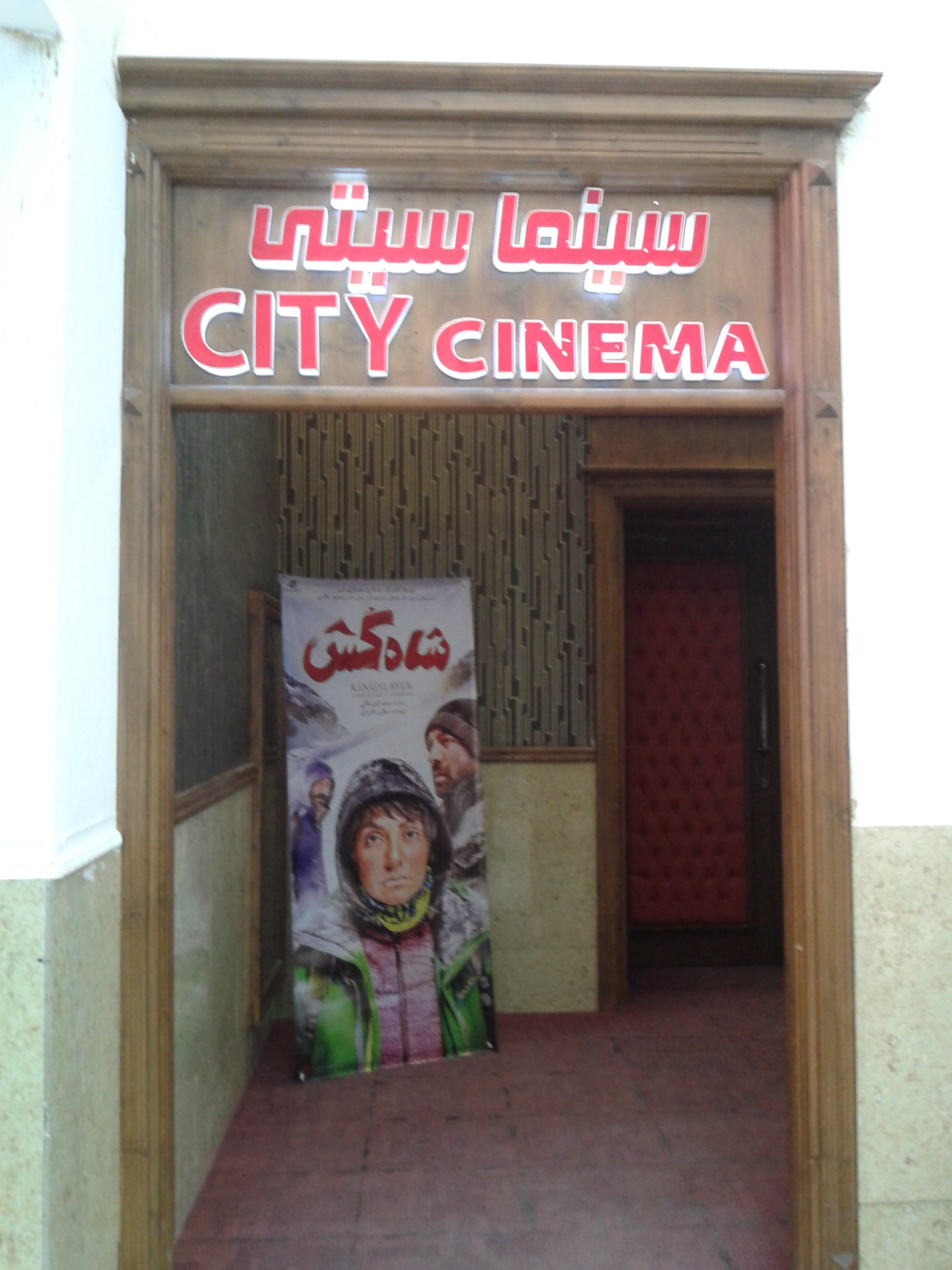 ورودی سالن سینما سیتی قشم - مهر ۱۳۹۸